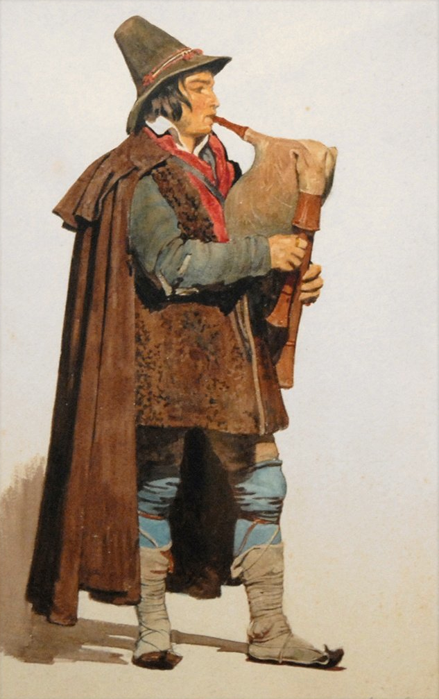 Joueur de Zampognalabel QS:Lfr,"Joueur de Zampogna"